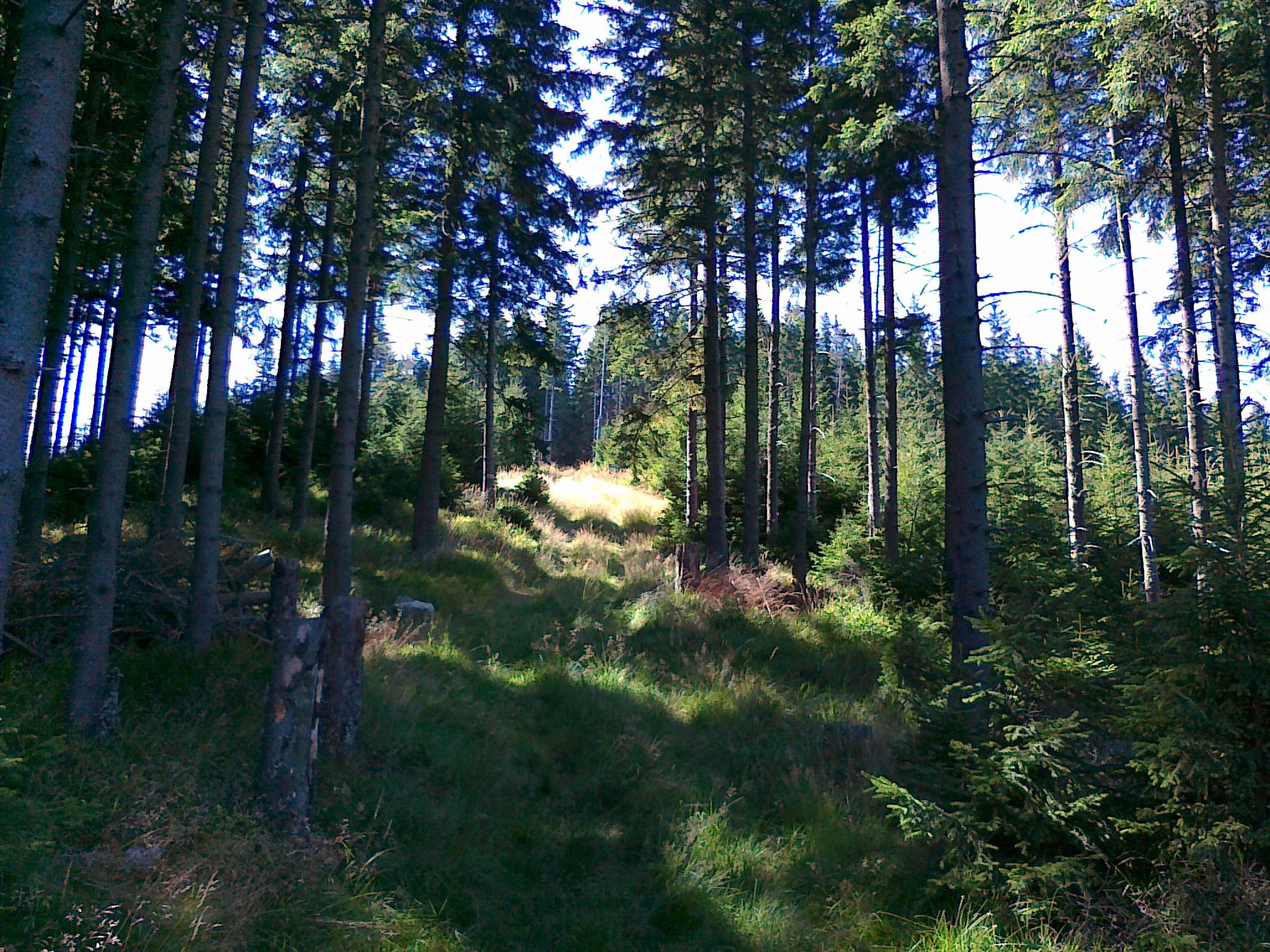 Dróżka prowadząca na szczyt góry Prostřední vrch